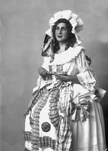 Нина Сластенина в роли Графини Альмавива («Безумный день, или Женитьба Фигаро», 1927, МХАТ)